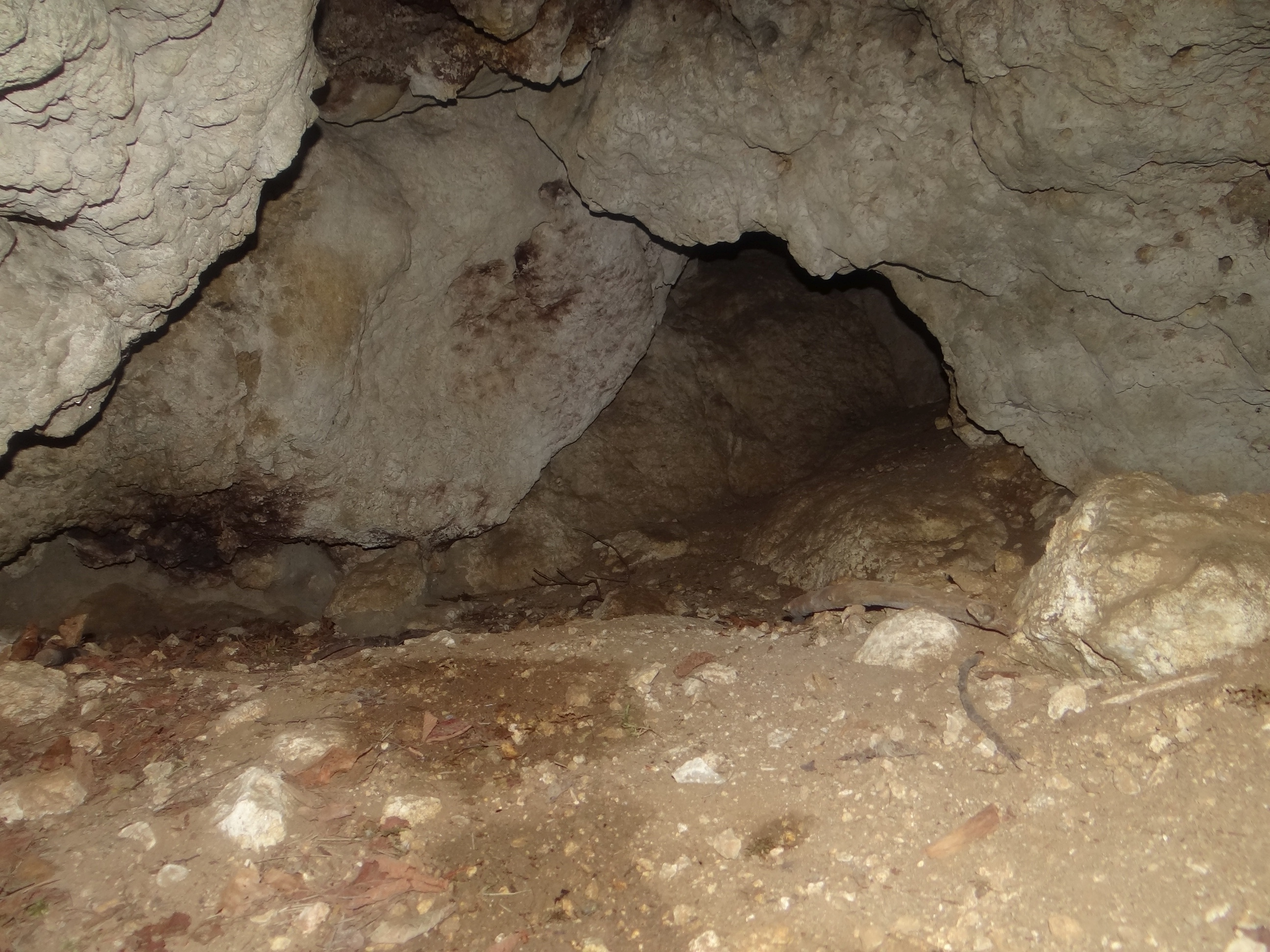 Jaskinia na Skałce